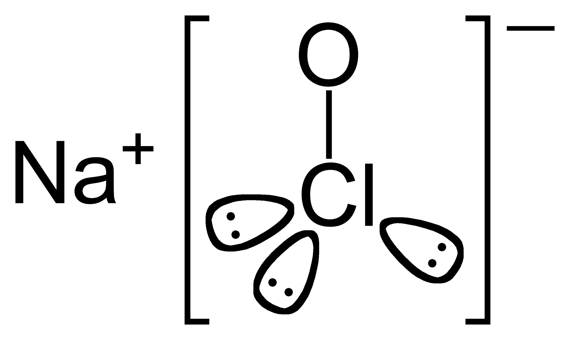 Sodium-hypochlorite